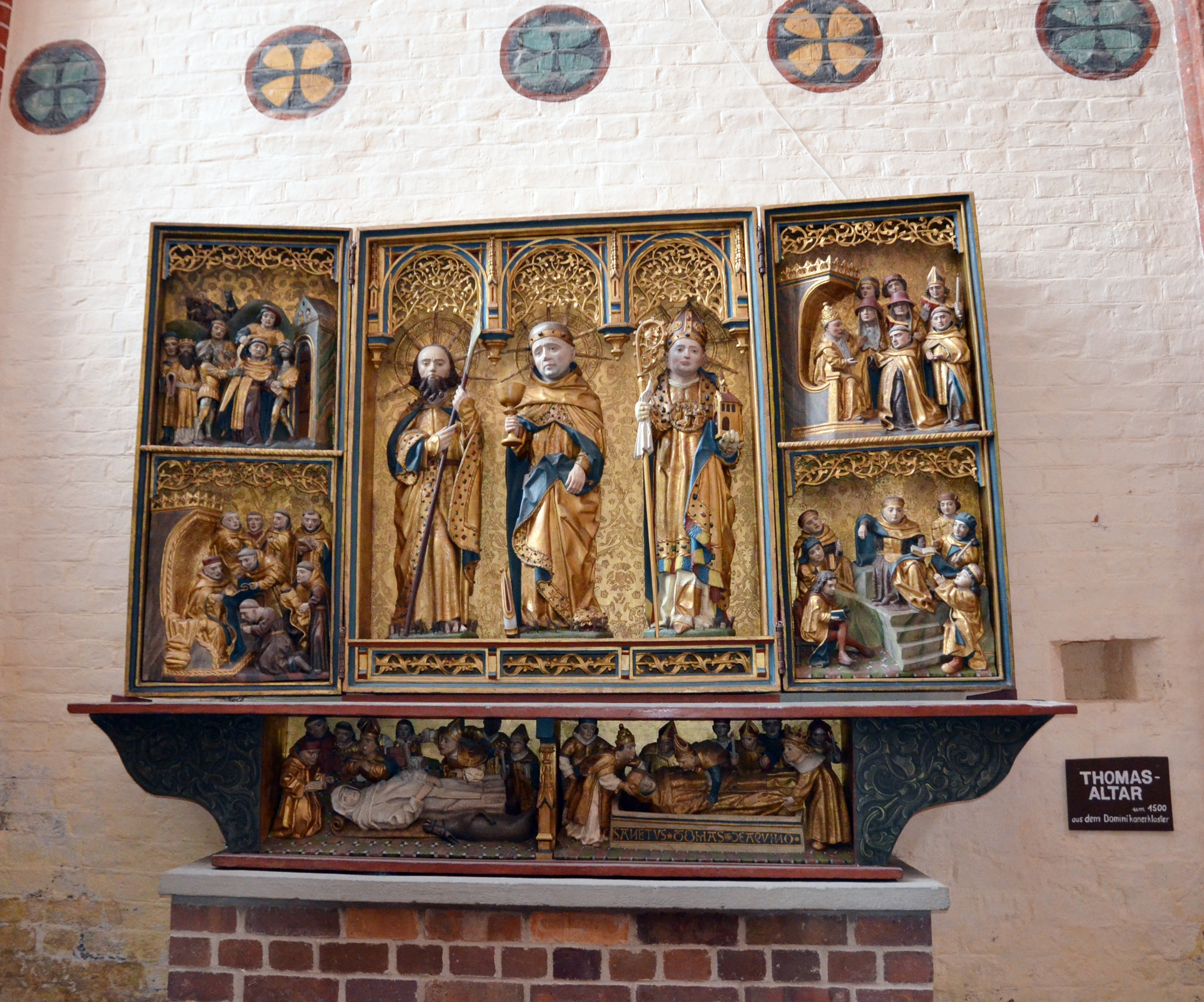 Nikolaikirche (Wismar)